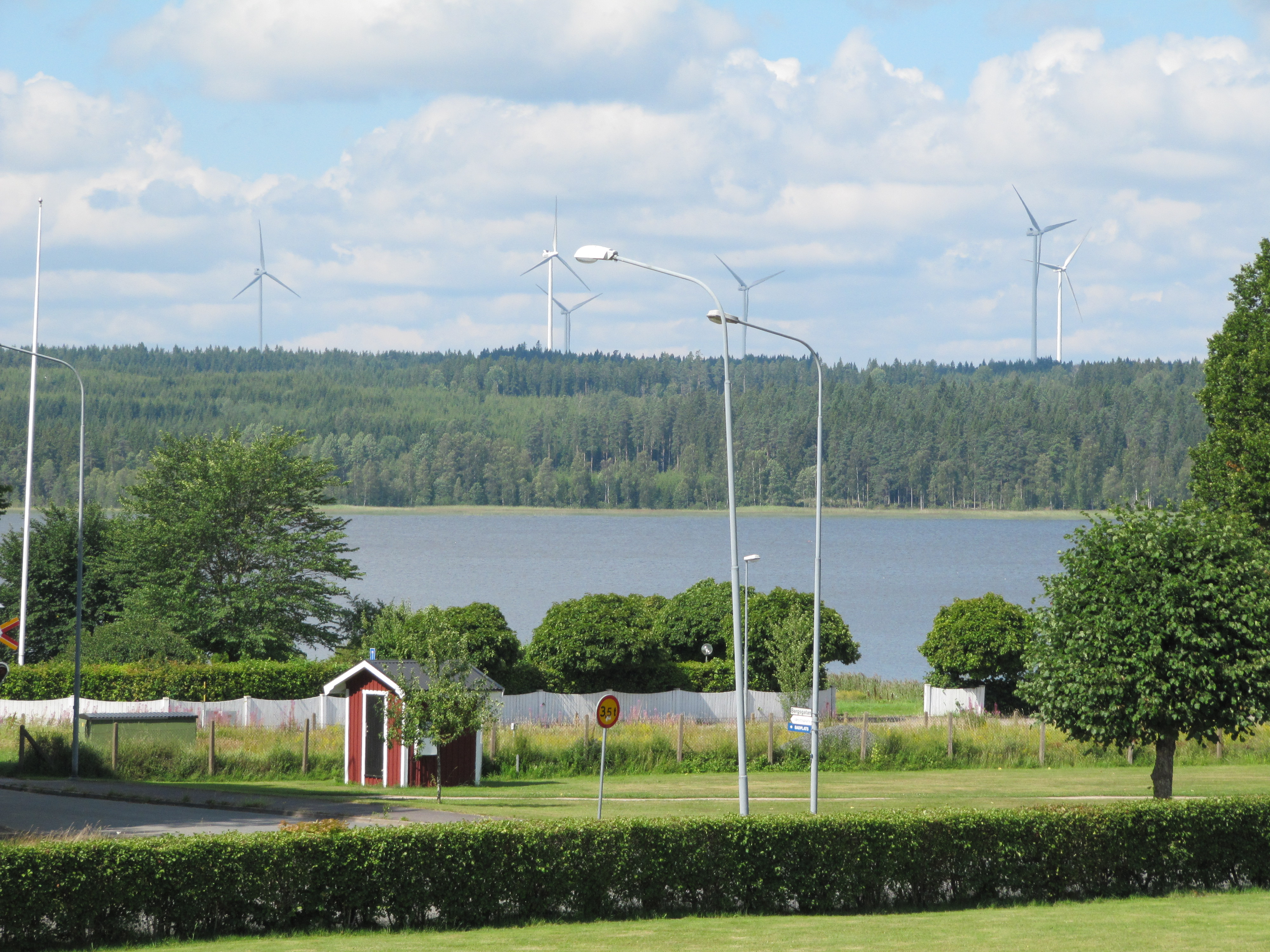 Ekenässjöns östra del